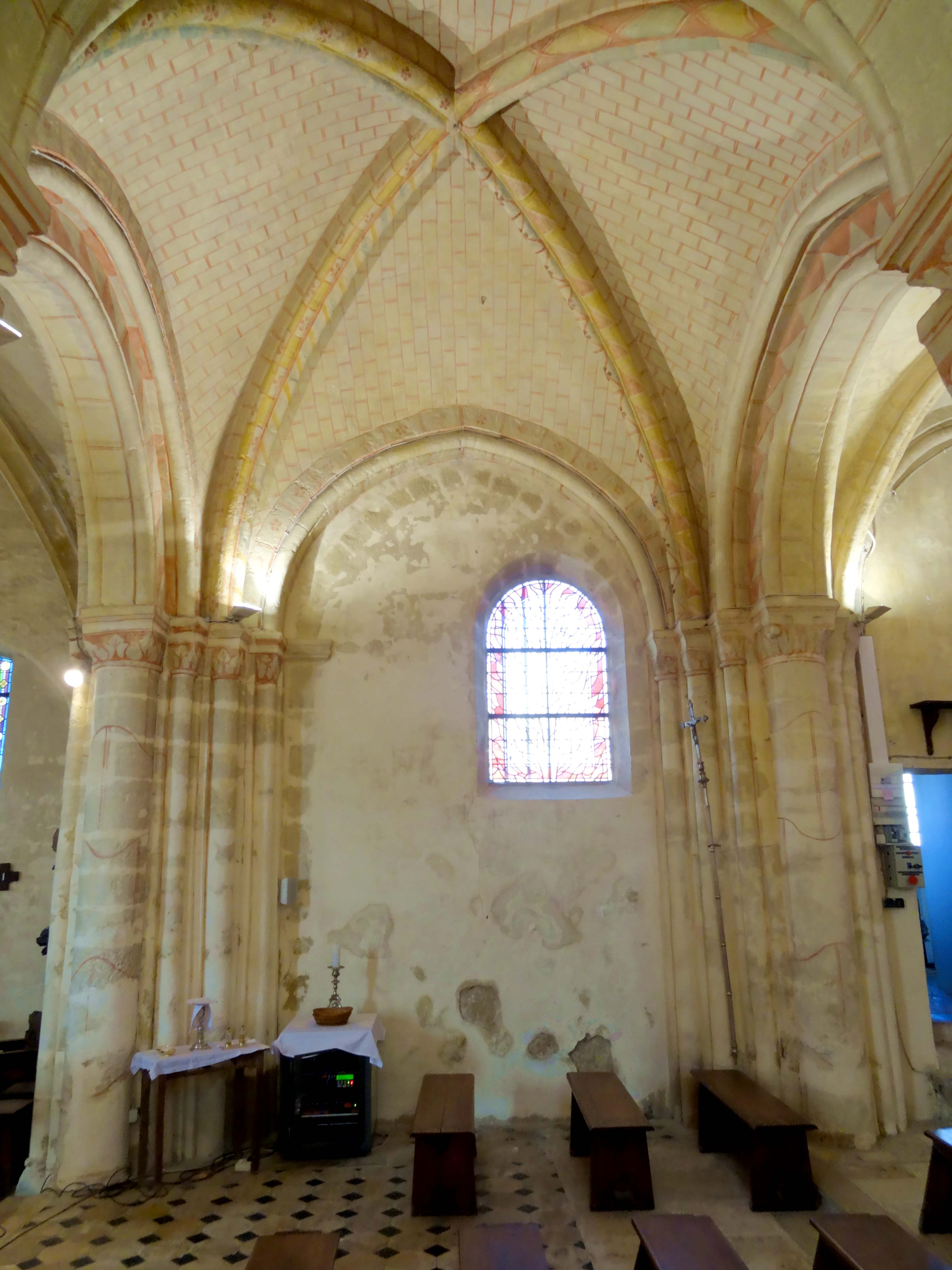 Intérieur de l'église - voir titre.